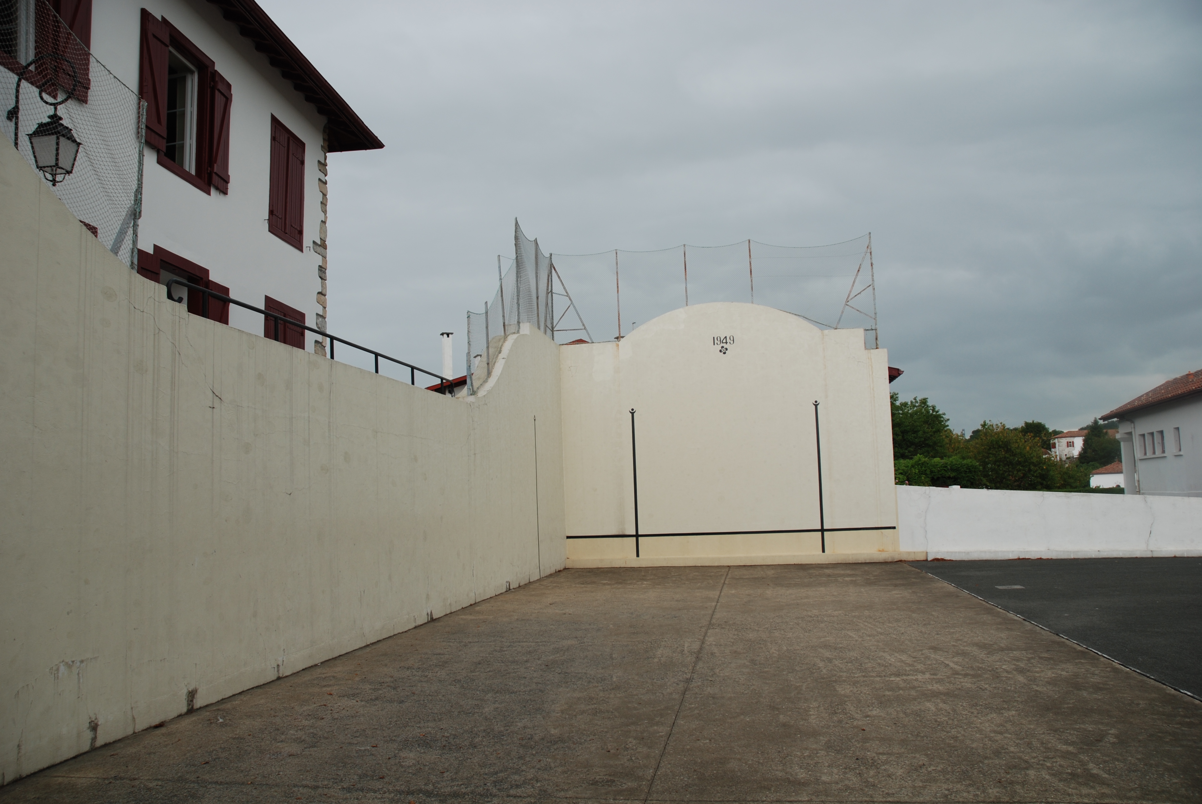 Villefranque, fronton mur à gauche